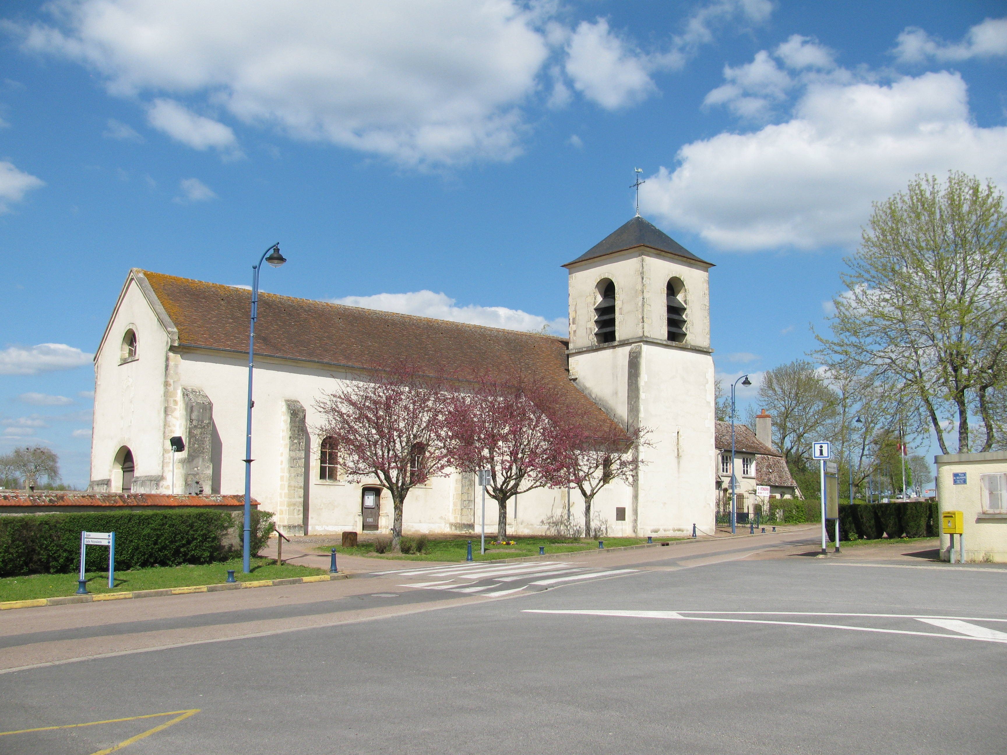 Église Saint-Maurice de Sermoise-sur-Loire, Nièvre, France.